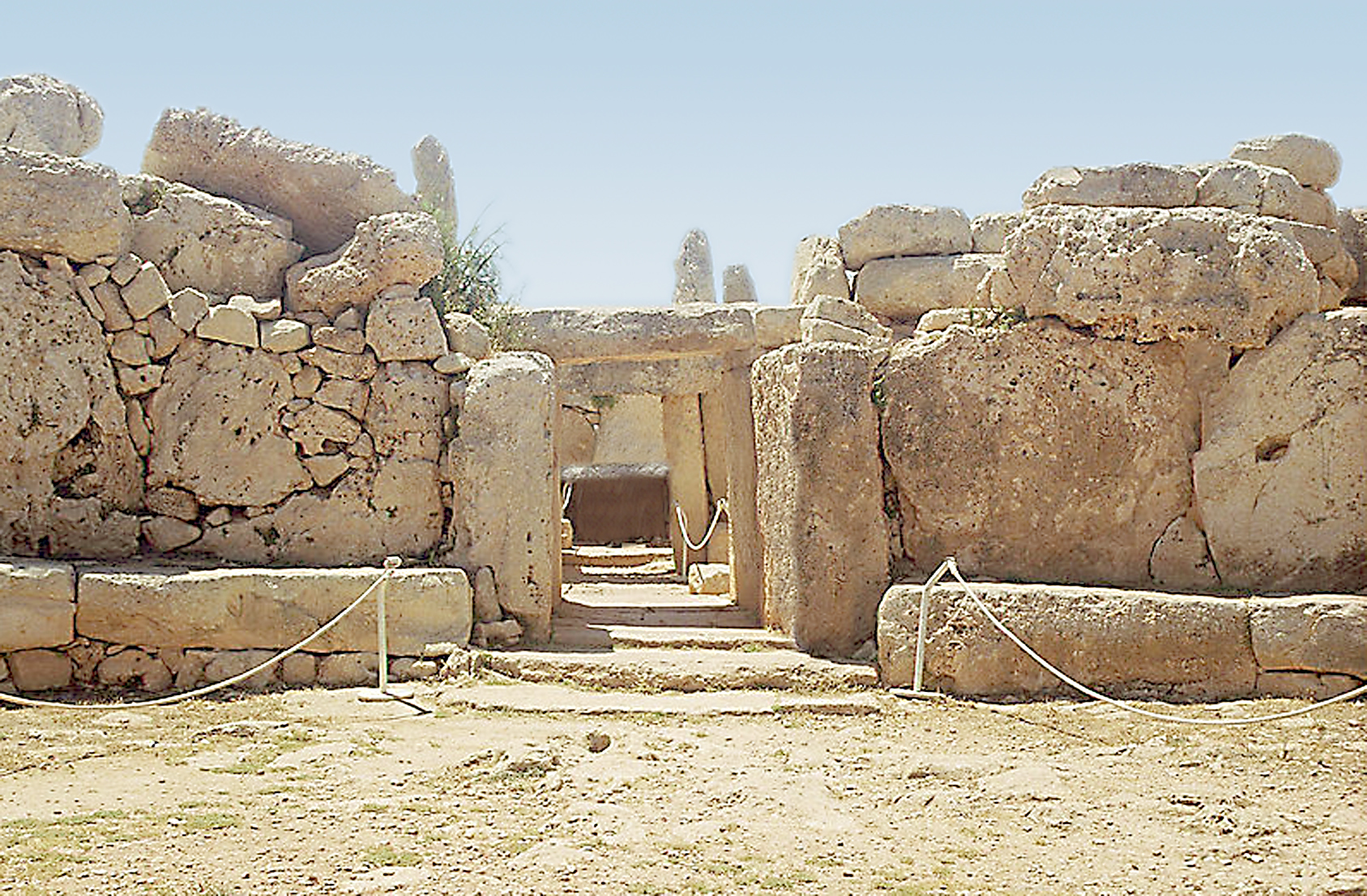 Mnajdra Temple on Malta